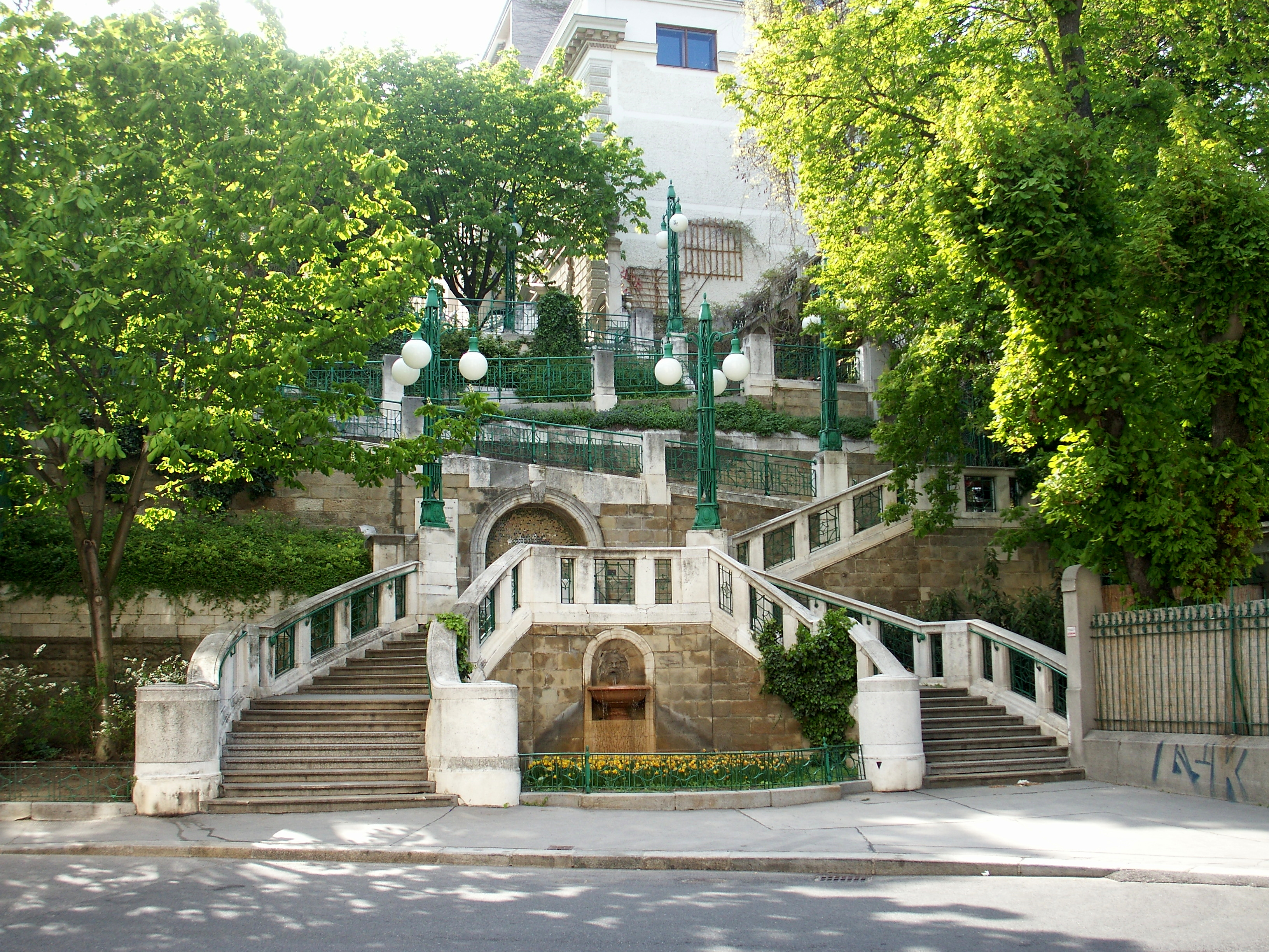 Strudlhofstiege, Wien